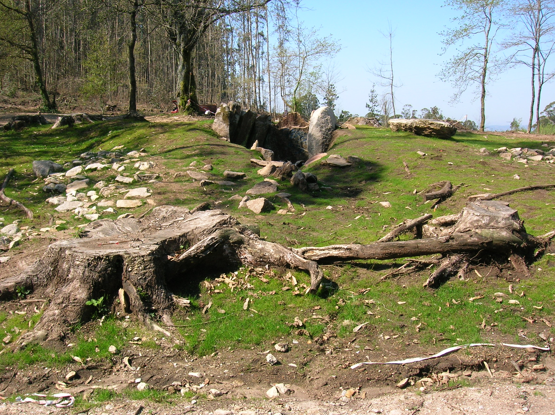 Mámoa e cámara do monumento Chan da Armada 1, tralas últimas escavacións. Imaxe tomada en Marzo de 2009.